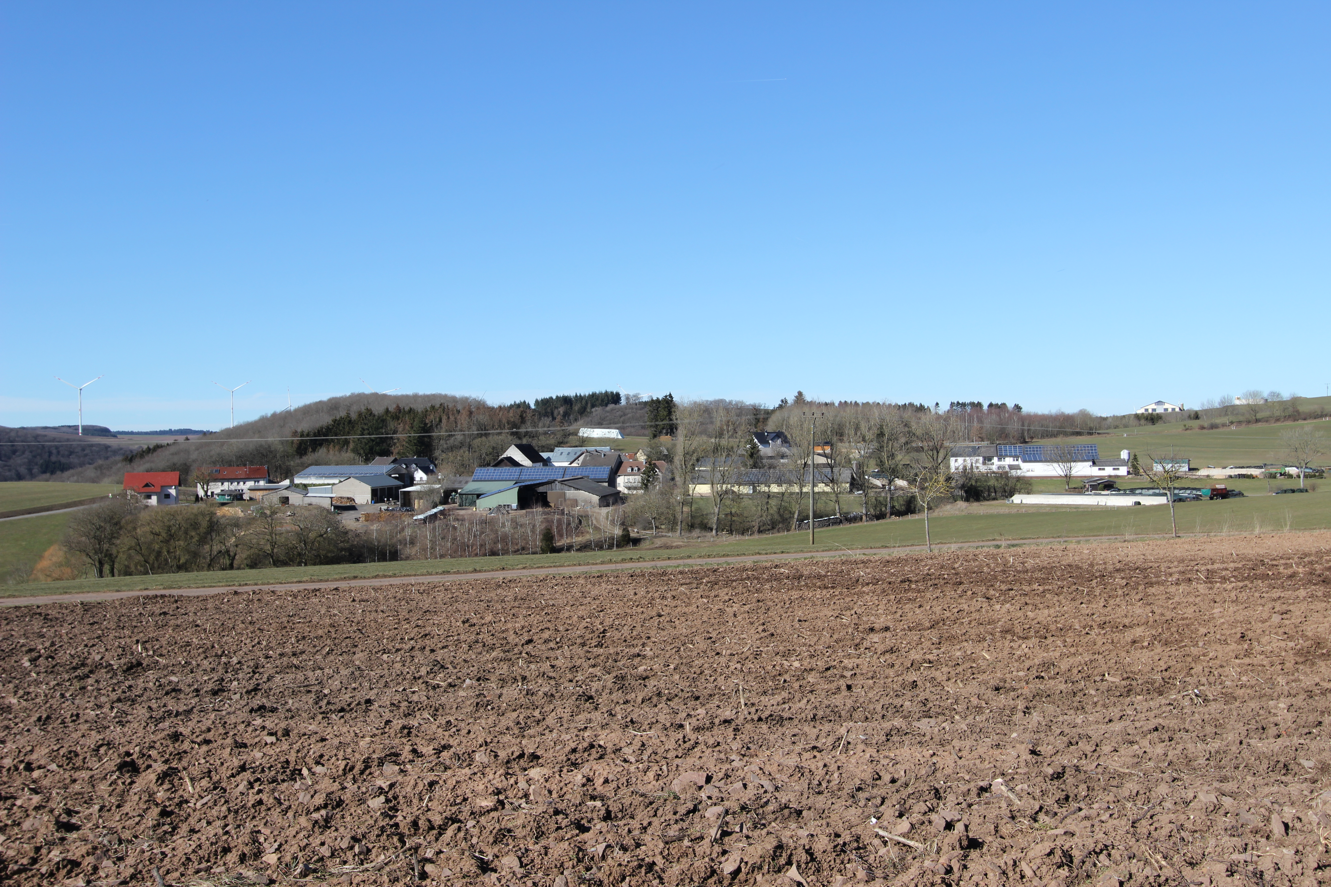 Pintesfeld in der Eifel gehört zur Verbandsgemeinde Arzfeld und liegt nördlich von Waxweiler im Westen der Eifel, nur wenige Kilometer östlich der Staatsgrenzen zu Luxemburg und Belgien. Aufnahme von 2019.